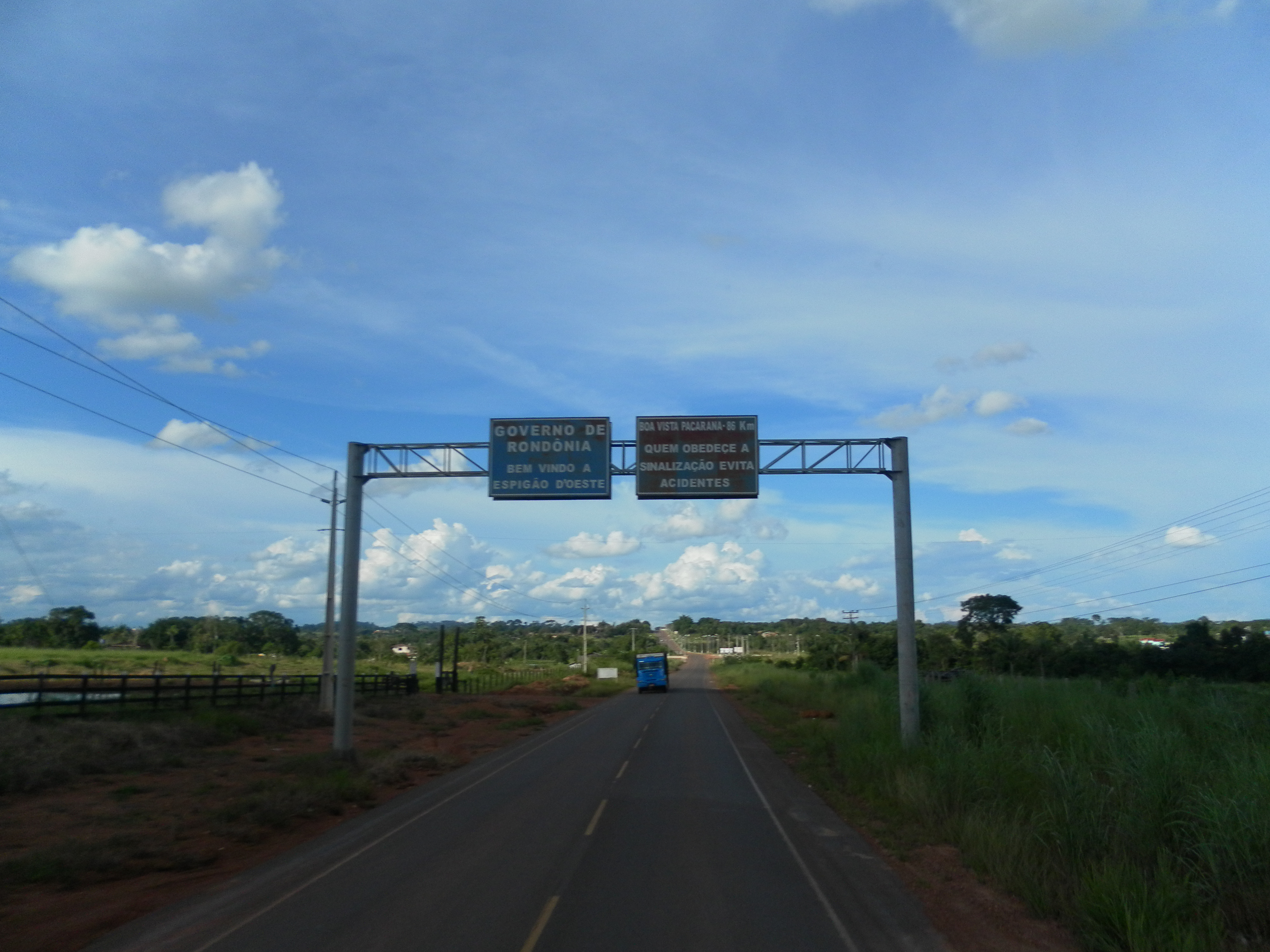 RO 387, chegando em Espigão do Oeste, Rondônia.